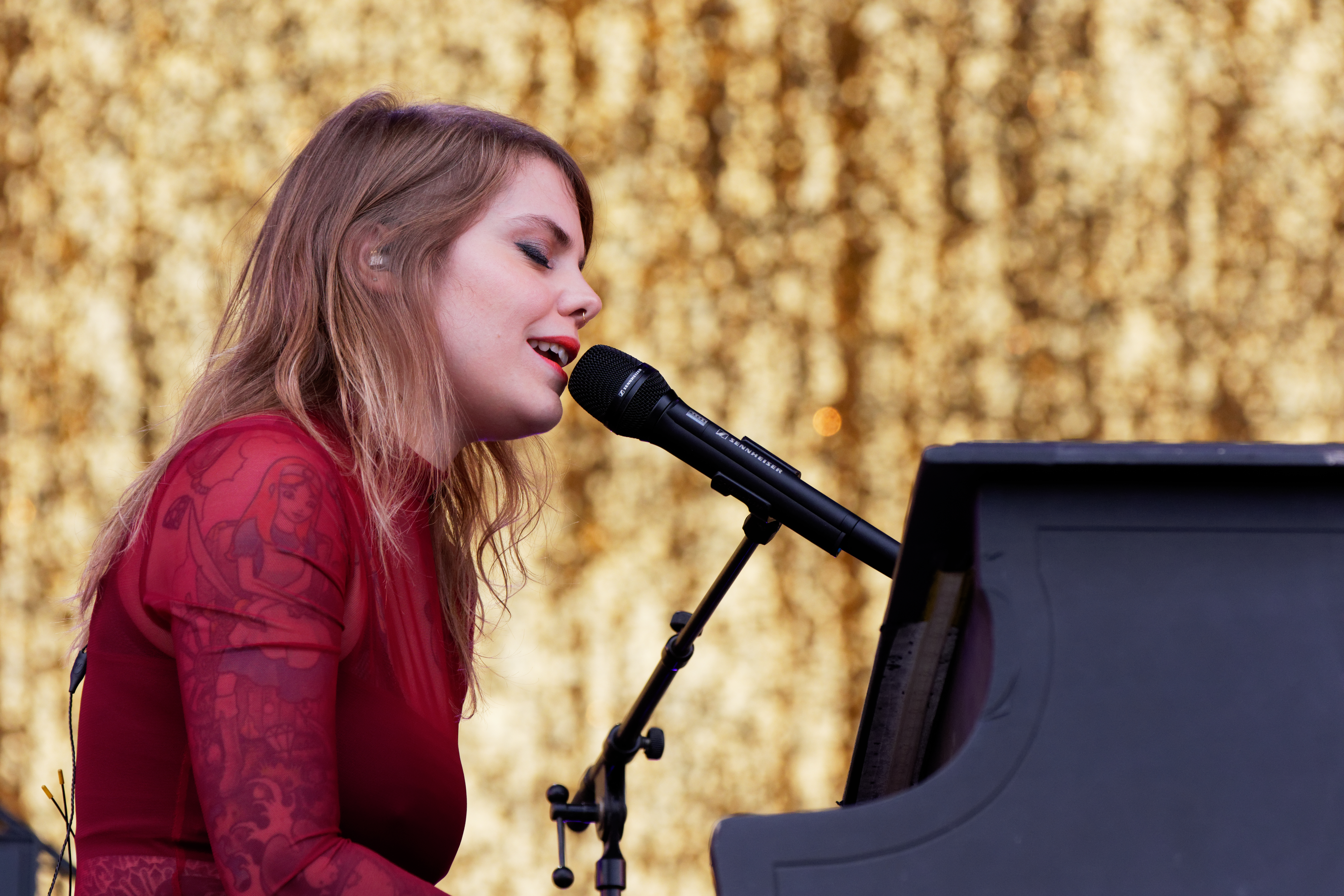 Cœur de pirate en concert lors du festival des vieilles charrues 2018.